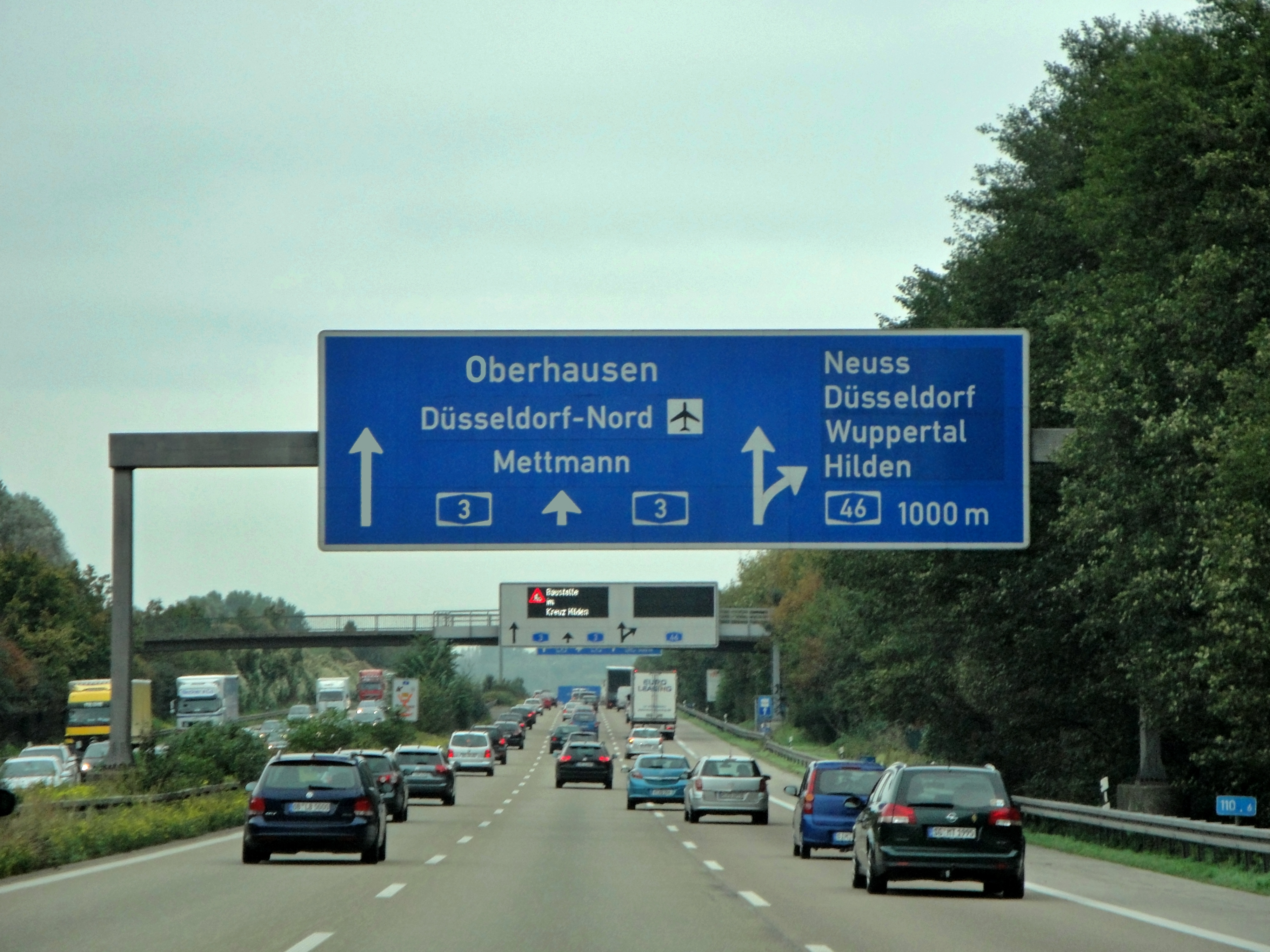 Die A3 zwischen Köln und Düsseldorf